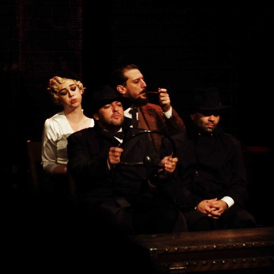 39 Basamak oyununun Müşterek tiyatro temsilinden bir görüntü